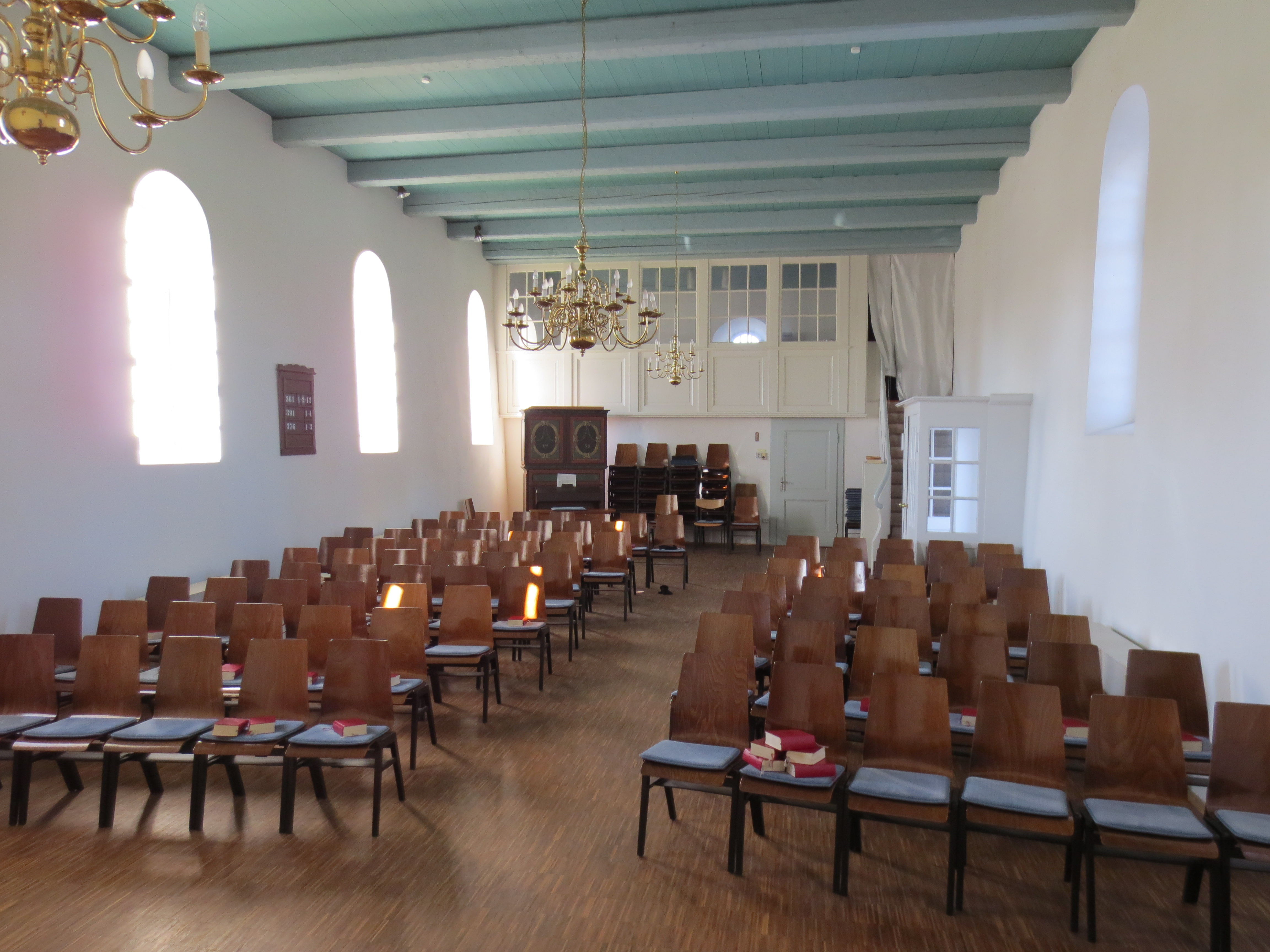 Emden-Borssum, Alte Kirche Schöpfwerkstraße, Innenraum